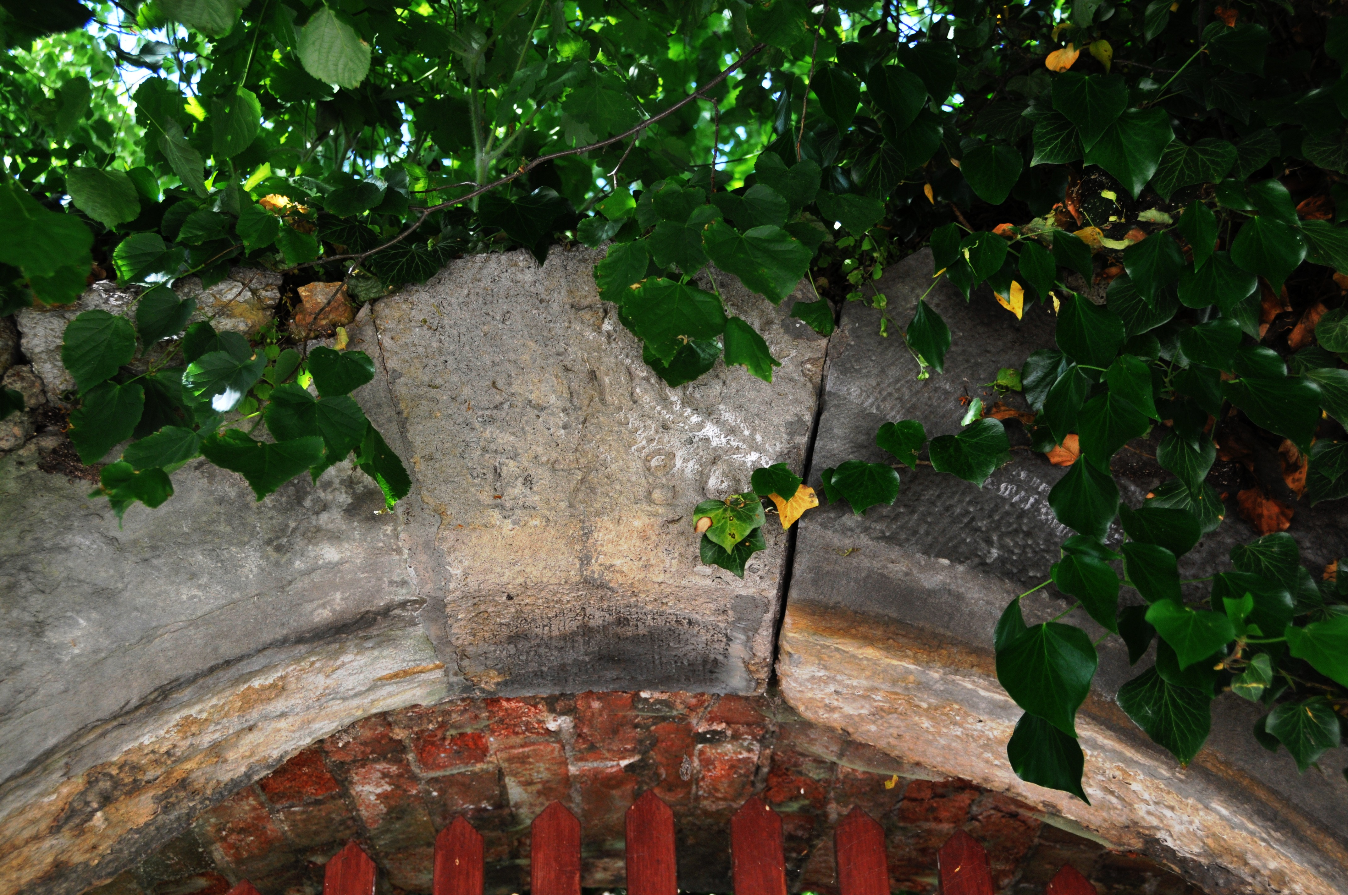 Kirchhoftor Röhrensee